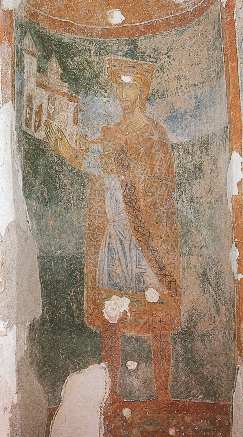 Први српски краљ,Михајло Војислављевић,ктиторски портрет из цркве светог Михајла у Стону.